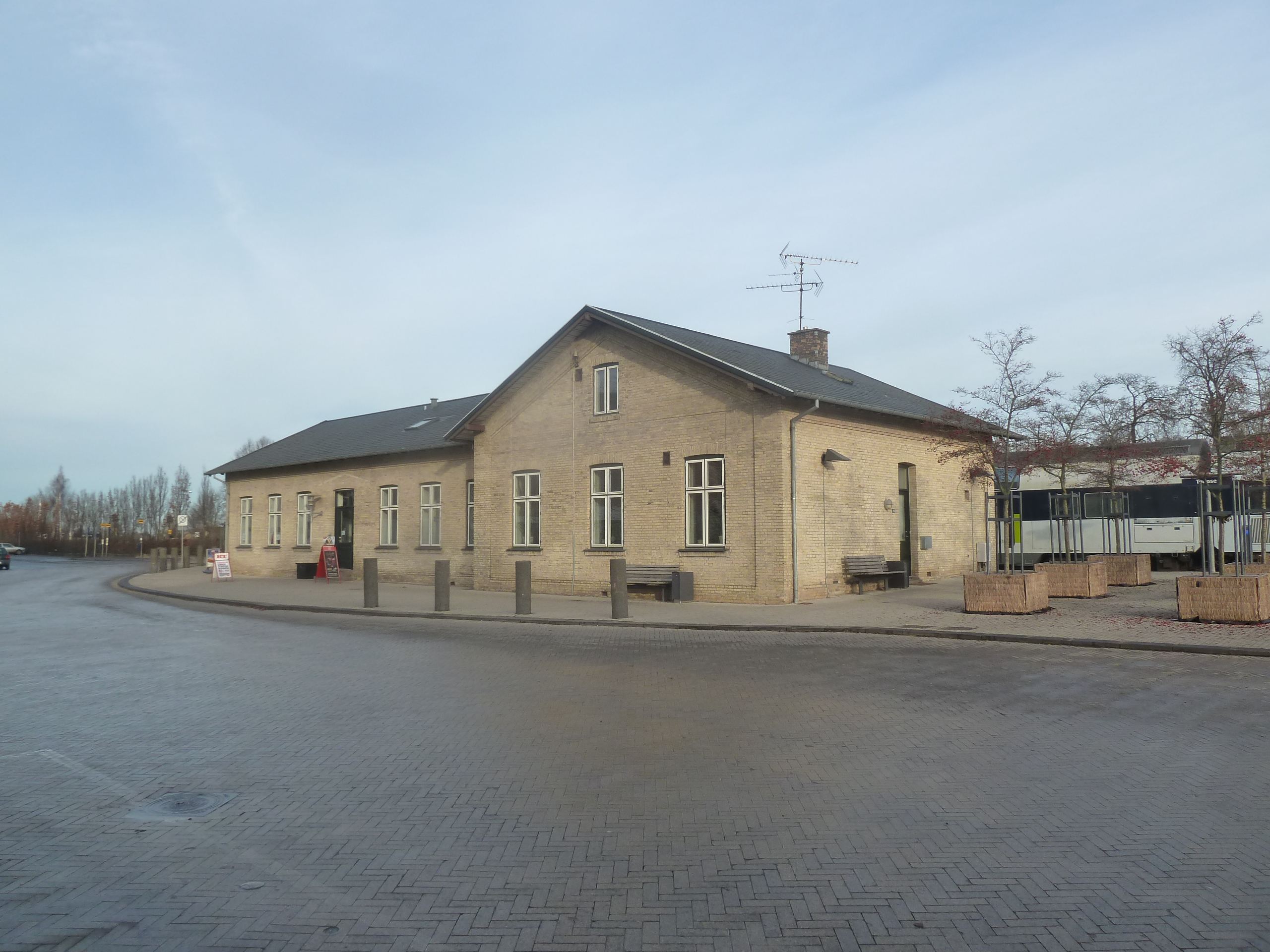 Tølløse Station on Nordvestbanen in Denmark.